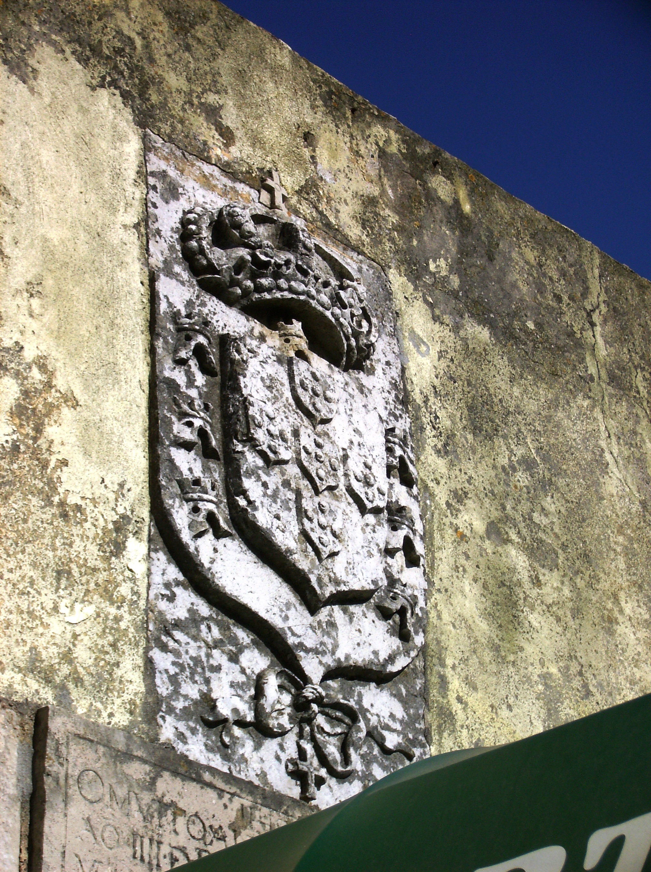 Forte de São Pedro do Estoril, Estoril, Cascais, distrito de Lisboa, Portugal: pedra de armas.